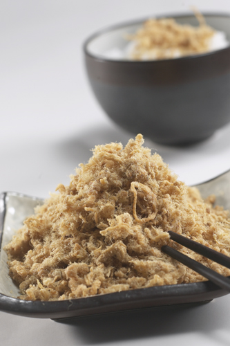 Fragrance Brand Pork Floss taken by Eddie Khoo in February 2006